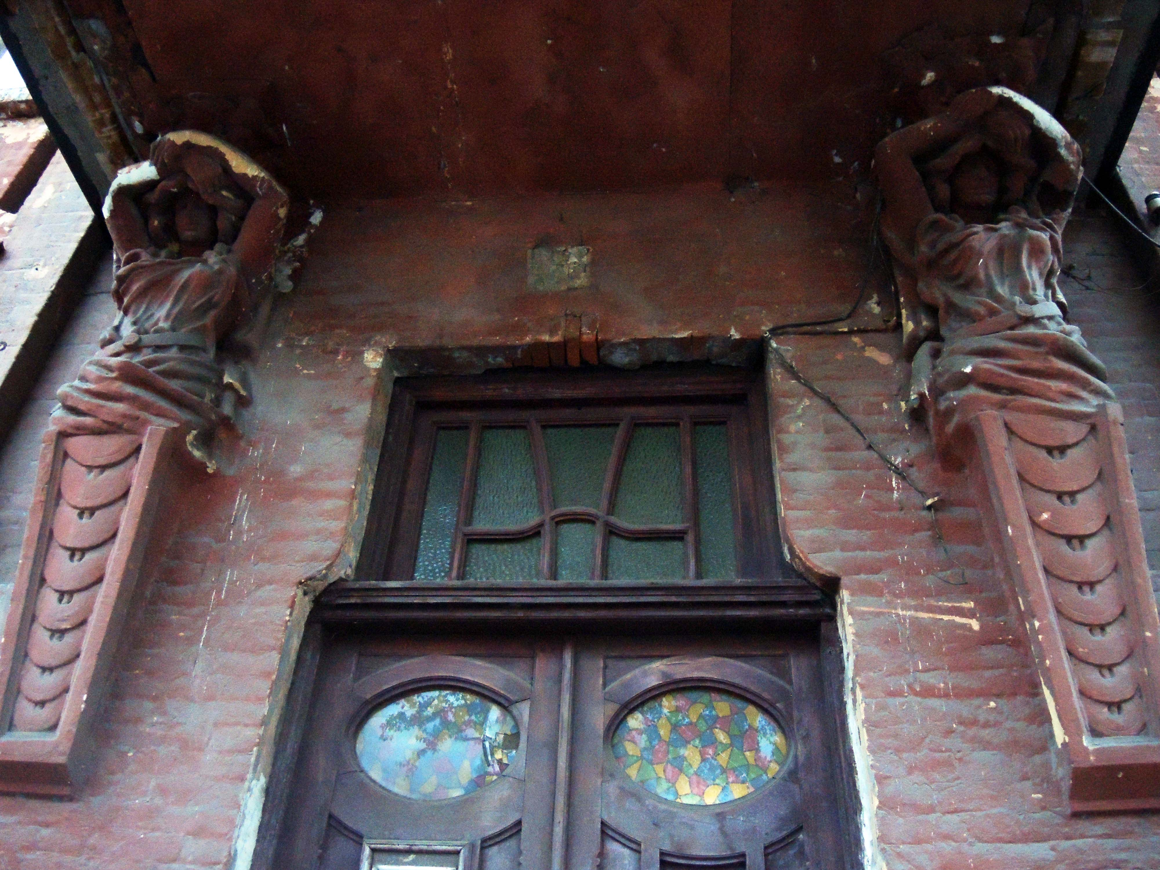 Особняк Ястремского: улица академика Миллера, 33, Владикавказ, Северная Осетия